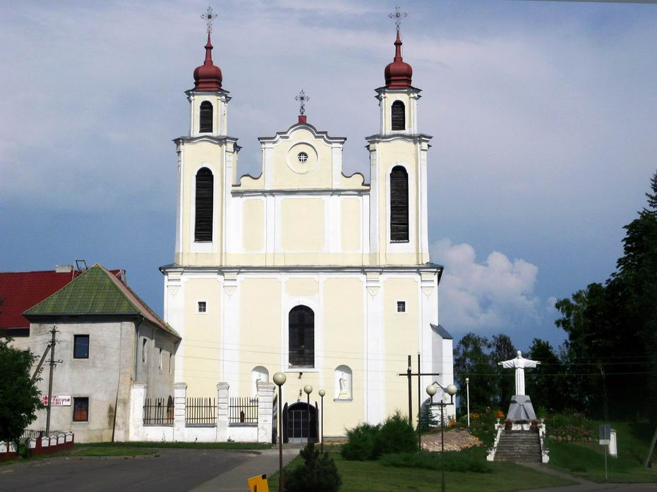 Беларуская (тарашкевіца): Касьцёл Сьвятых Апосталаў Пятра і Паўла ў Іўі